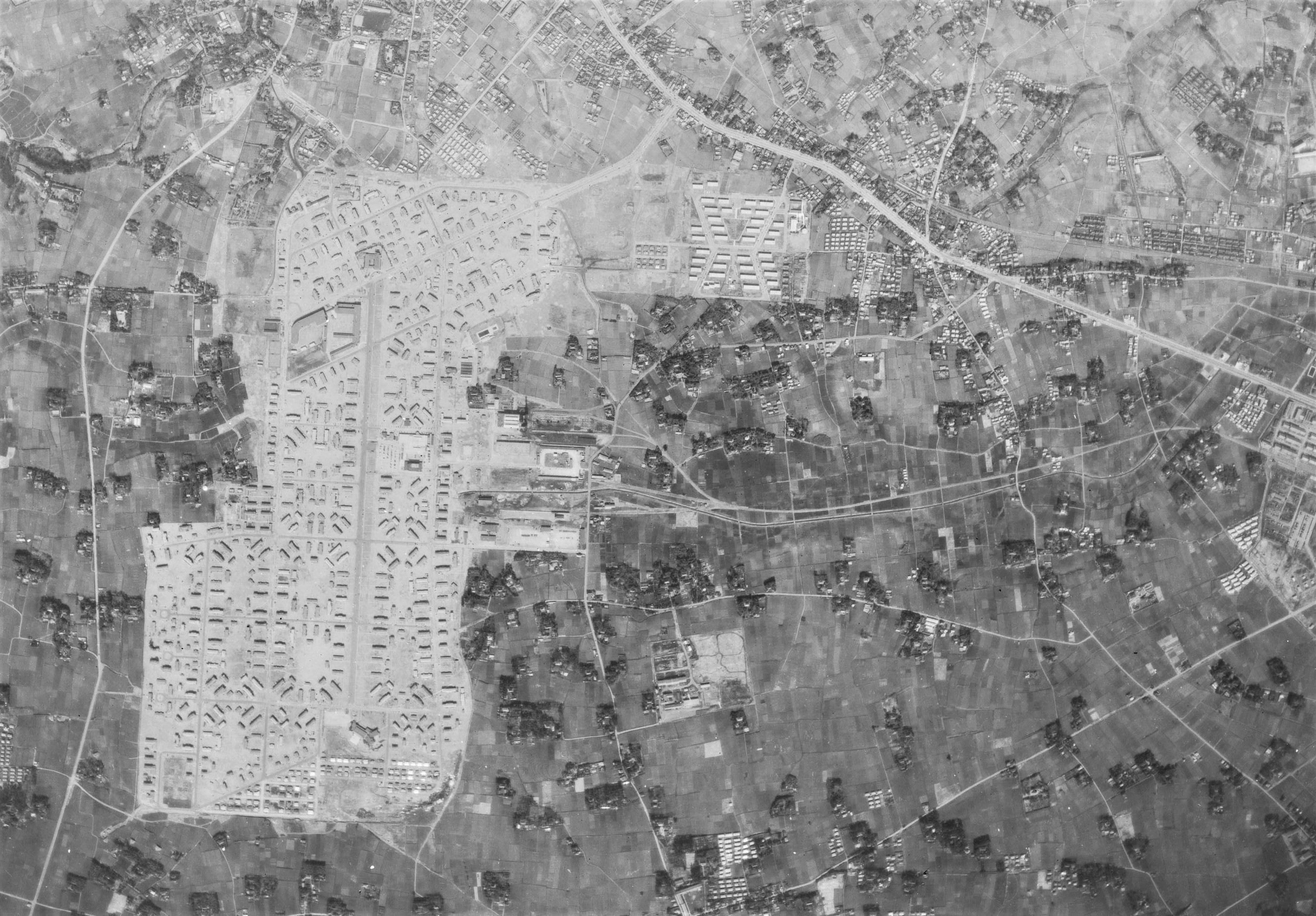 The copyright holder of this file, the Ministry of Land, Infrastructure, Transport and Tourism of Japan, allows anyone to use it for any purpose, provided that the copyright holder is properly attributed. Redistribution, derivative work, commercial use, and all other use is permitted. Attribution: Copyright © National Land Image Information (Color Aerial Photographs), Ministry of Land, Infrastructure, Transport and Tourism This image is copyrighted by the Ministry of Land, Infrastructure, Transport and Tourism of Japan. For terms of use, see the stipulation to use of National Land Information (in Japanese) and message from MLIT (in Japanese and English). When you display this image on an article, include the following phrase in the description: "Made based on [ National Land Image Information (Color Aerial Photographs)], Ministry of Land, Infrastructure, Transport and Tourism".